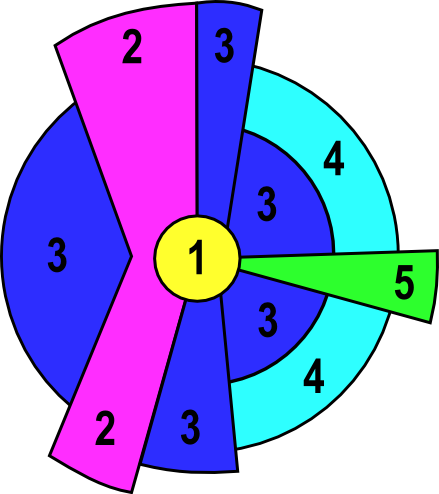 Linna sisestruktuuri mudel. Ühe keskusega sektormudel. Allikas: Maailma ühuskonnageograafia gümnaasiumile.